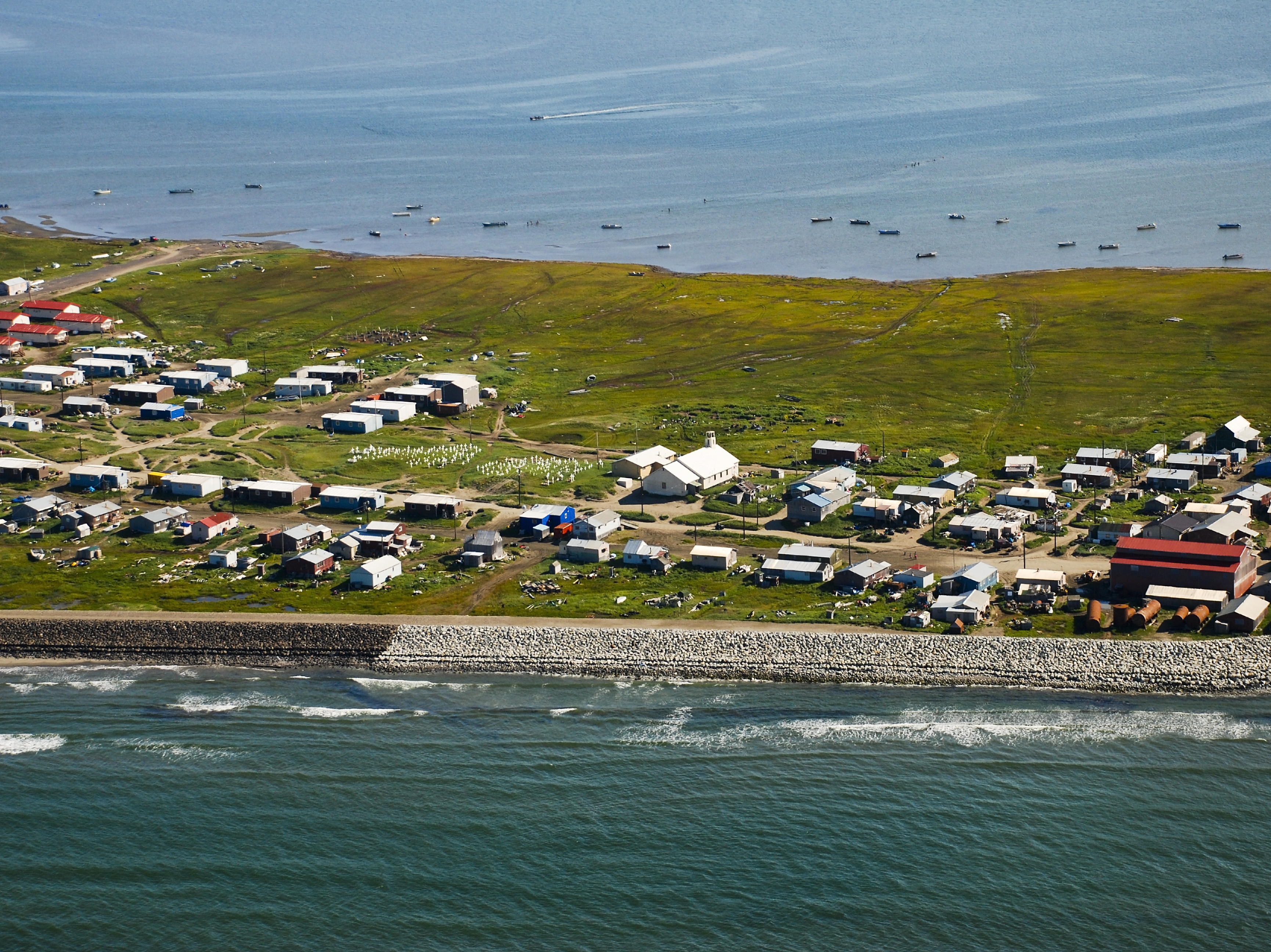 Shishmaref- Erin (53) edit